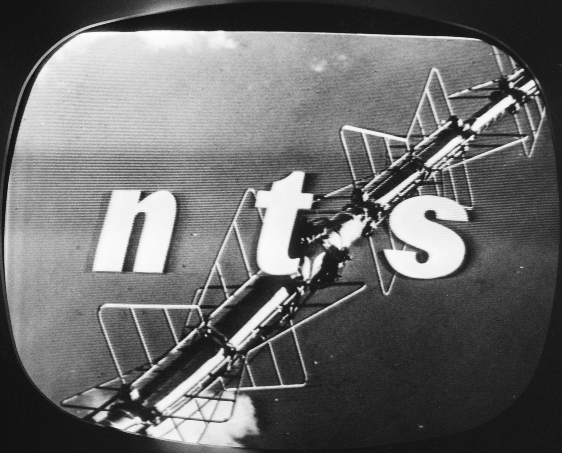 Testbeeld NTS 7 september 1961